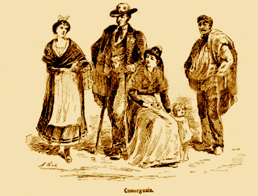 Costumes camarguais gravure du XIXe